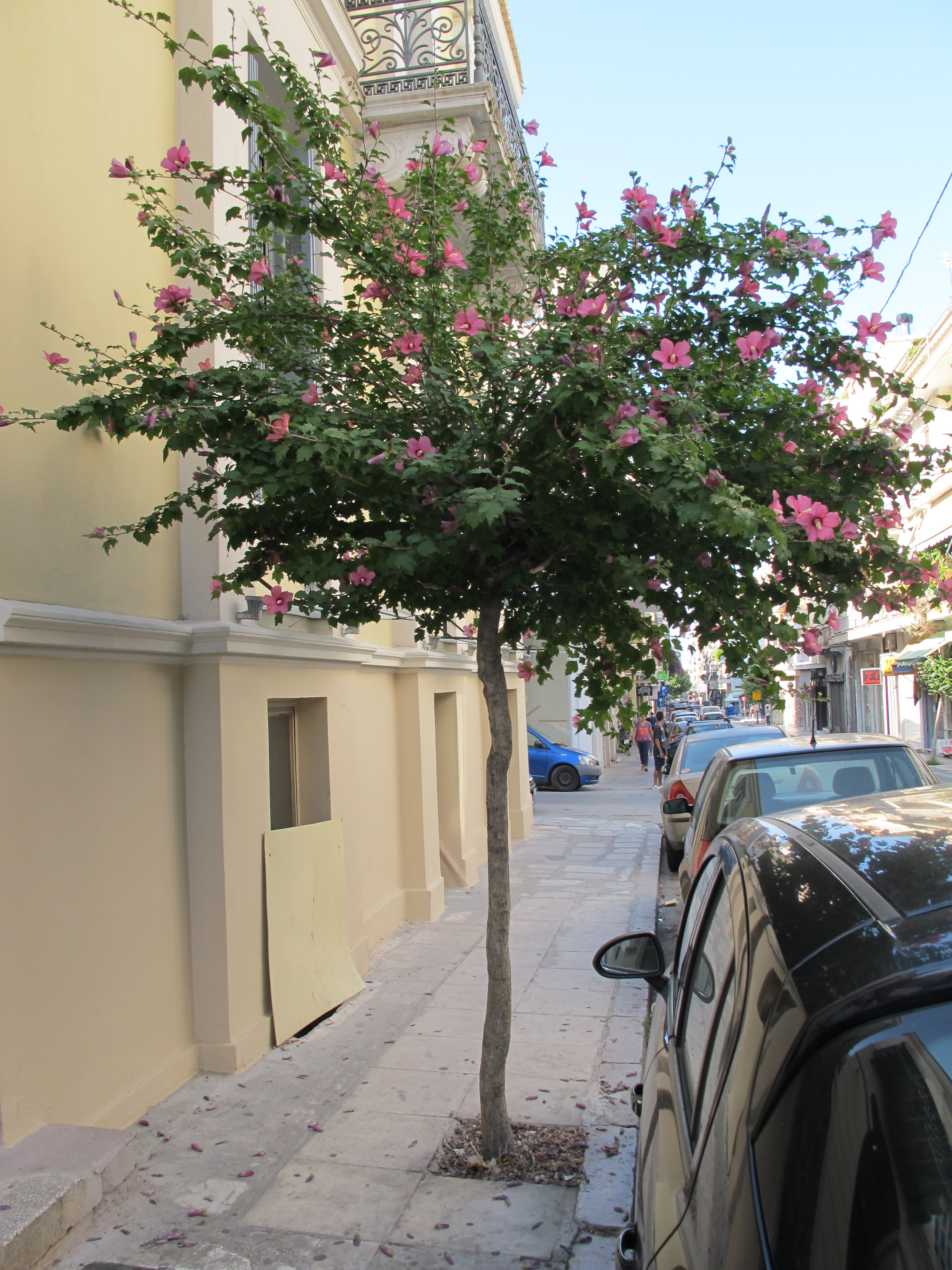 Hibiscus syriacus en arbuste